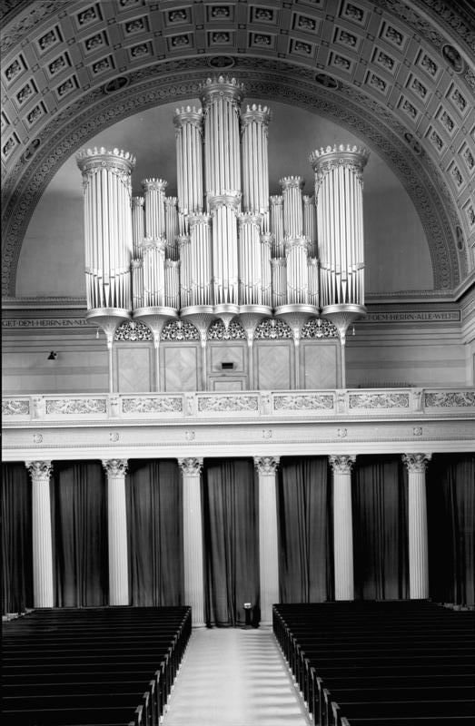 Potsdam.- Nikolaikirche